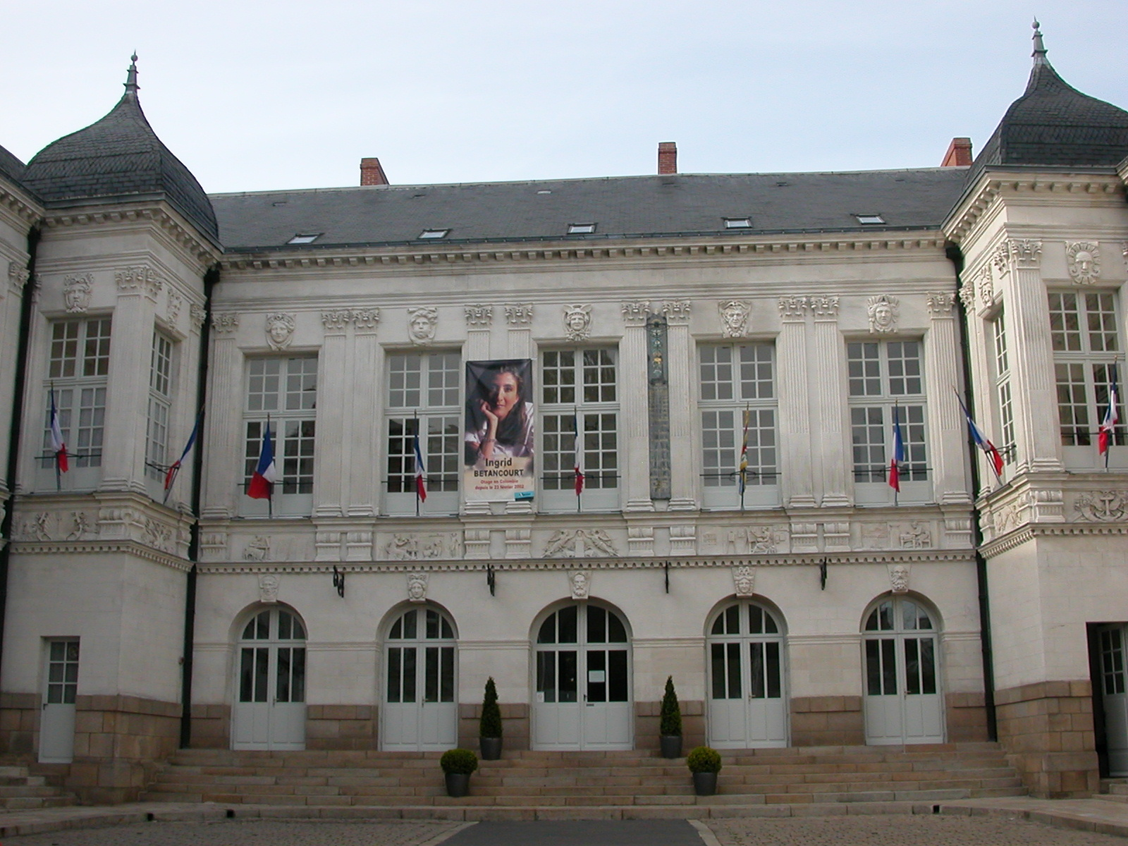 Façade de l'hôtel de ville de Nantes sur la place de l'Hôtel de Ville